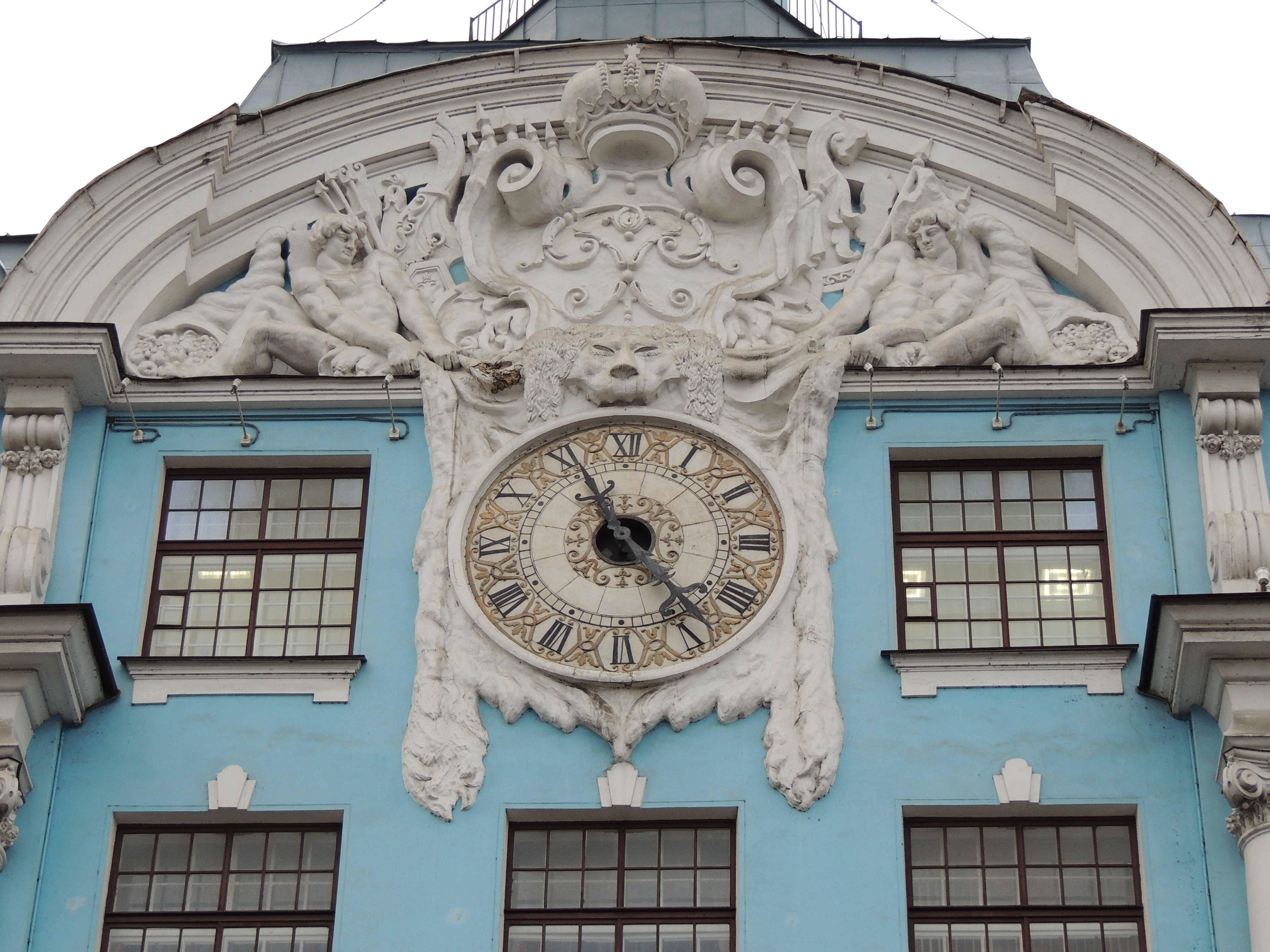 Nakhimov Naval School 1909-1910